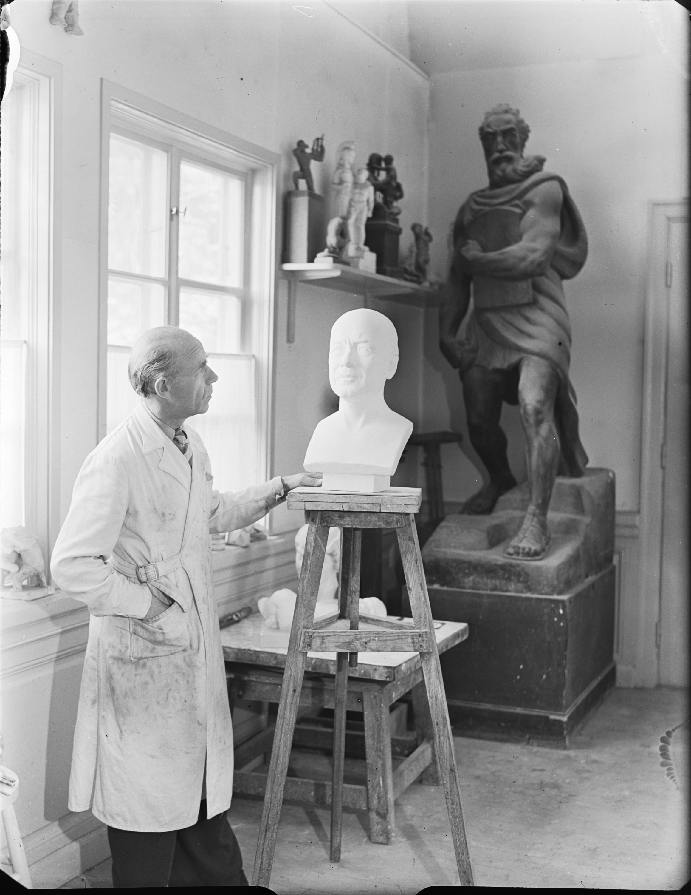 Porträtt av skulptör Anders Jönsson i sin ateljé. Interiör.